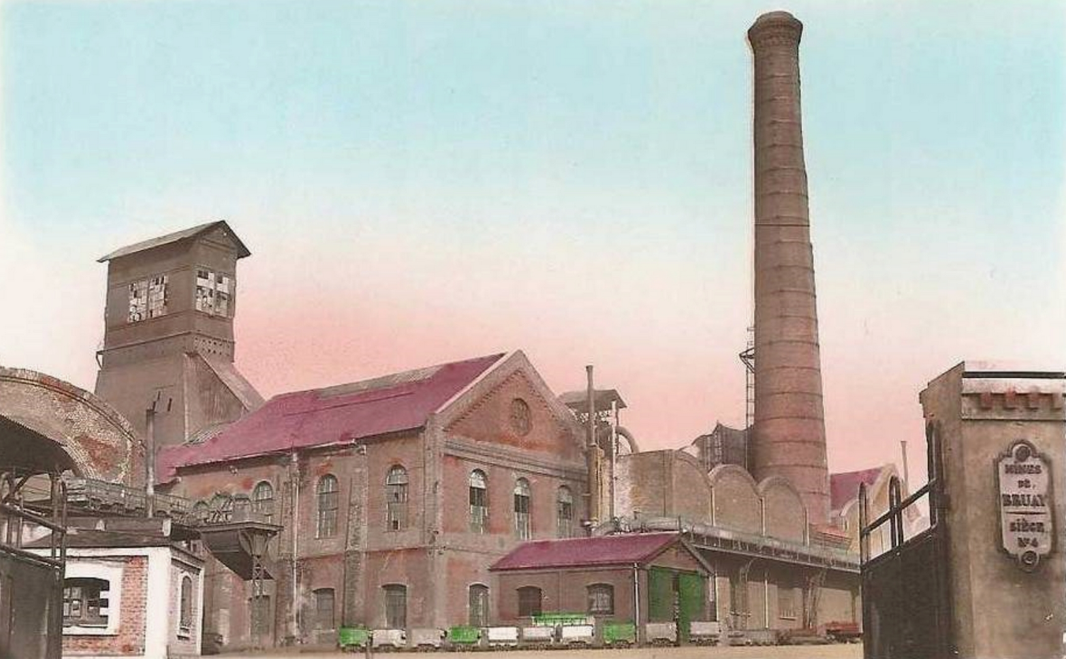 La Fosse n° 4 - 4 bis - 4 ter de la Compagnie des mines de Bruay était un charbonnage constitué de trois puits situé à Bruay-la-Buissière, Pas-de-Calais, Nord-Pas-de-Calais, France.